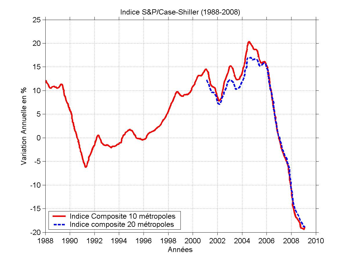 Indice S1P Case-Shiller : variation annuelle des prix en % de l'immobilier US de 1988 à 2008